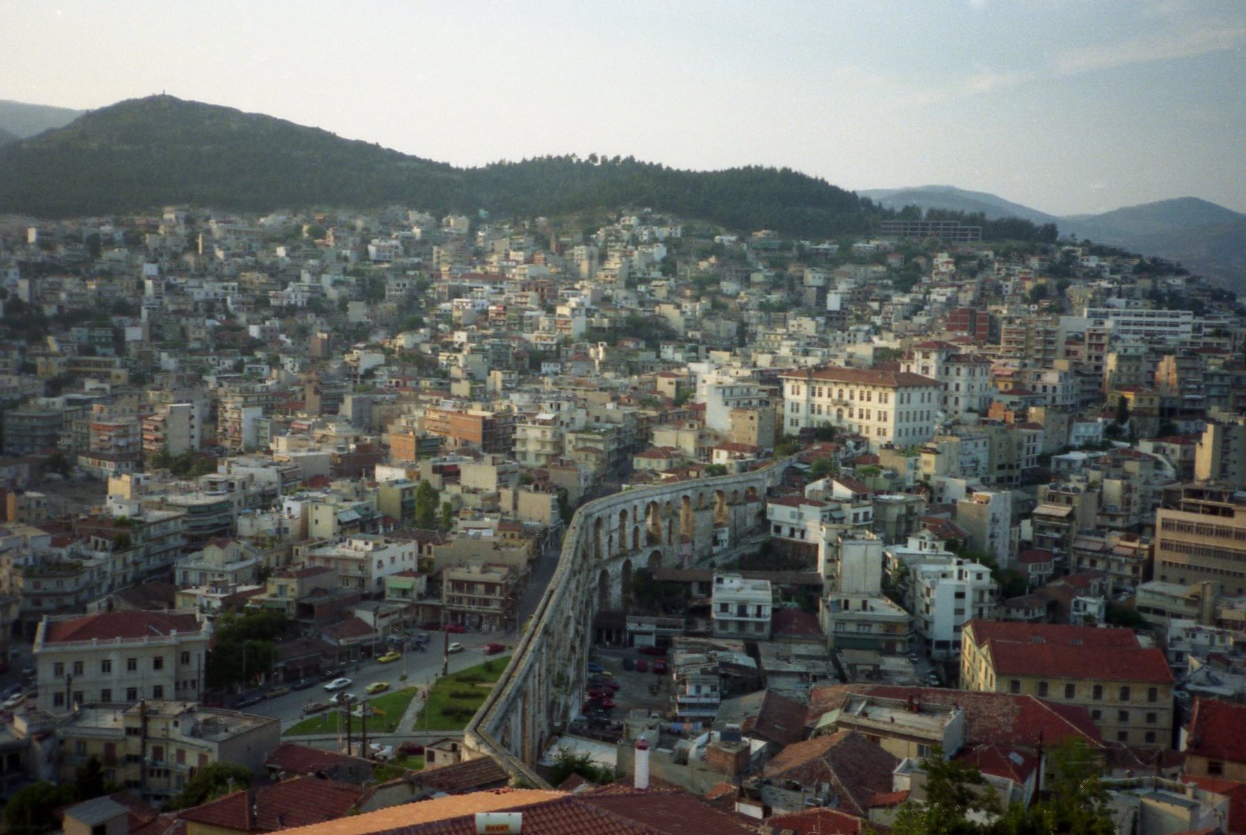 Kavala aqueduct